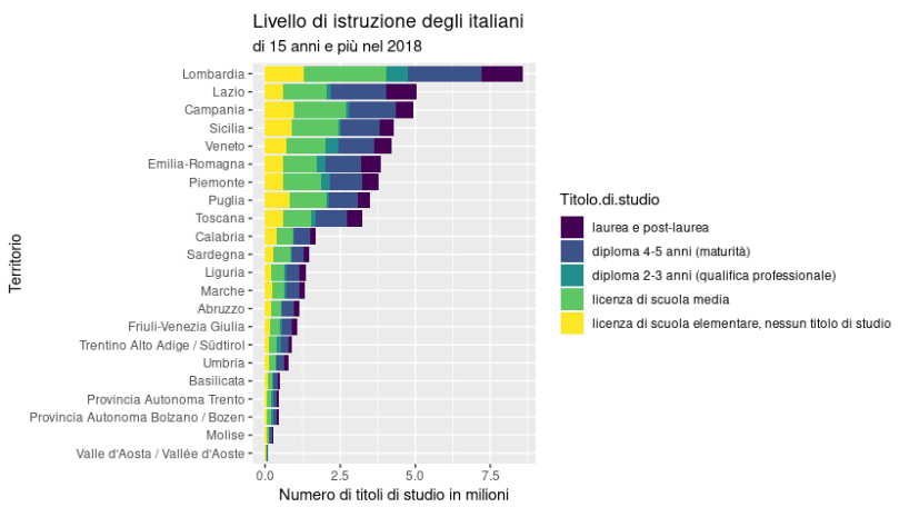 file realizzato con RStudio con dati Istat